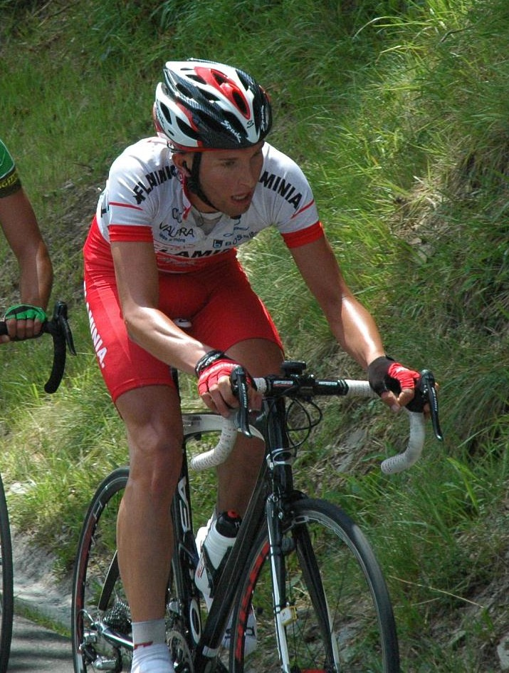 Tomasz Marczynski Euskal Bizikleta 2008, 3rd stage.